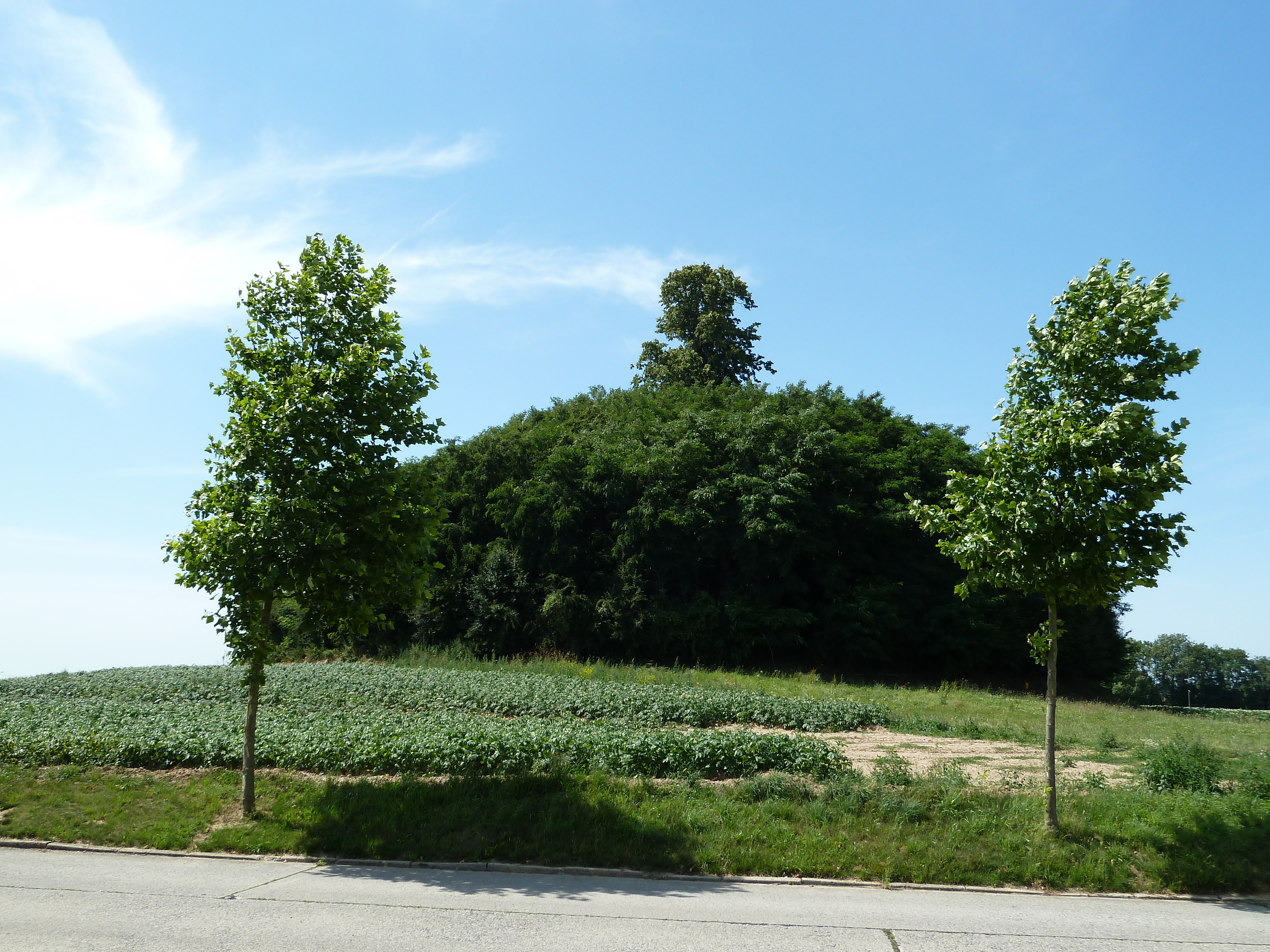 Tumulus de Glimes, Incourt, Belgique